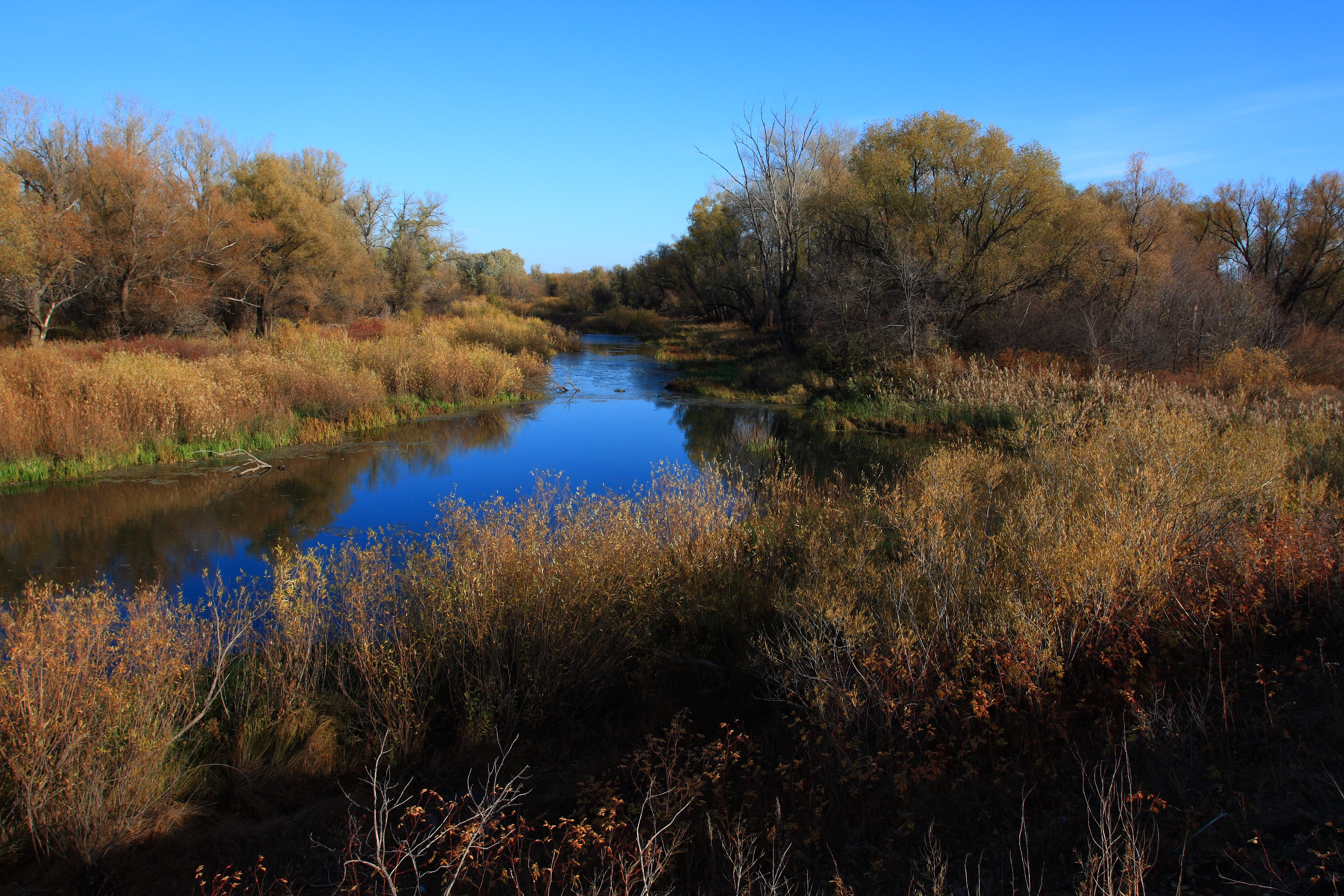 Вид на озеро в восточном направлении